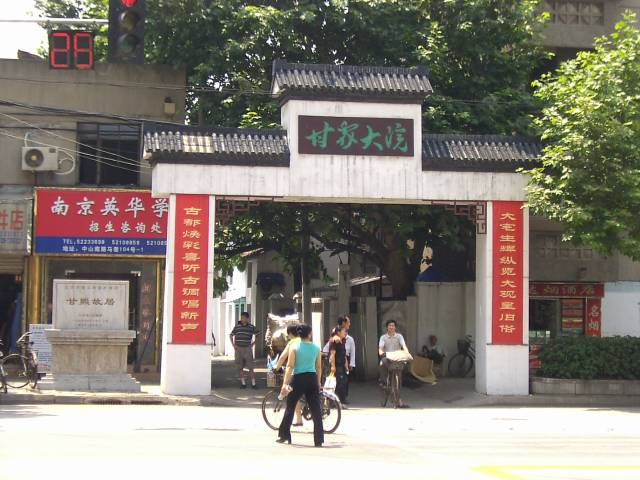 南京民俗博物館 甘熙故居 入口付近 撮影者:権作 参照：